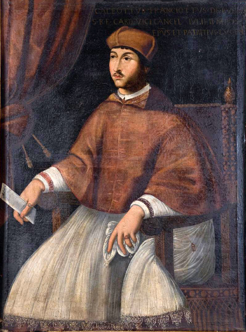 Galeotto Franciotti della Rovere, pronipote di papa Sisto IV e nipote di Giulio II è qui ritratto in veste di cardinale, seduto su di una pltrona di legno, il corpo leggermente volto di tre quarti, lo sguardo rivolto altrove. Nella mano destra un piccolo foglietto di carta ripiegato.